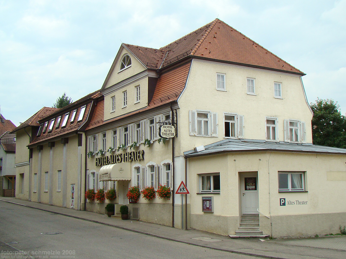 Denkmalgeschütztes Hotel Altes Theater in Heilbronn-Sontheim